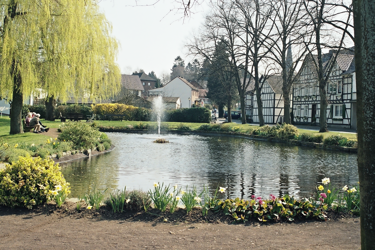 Dorfweiher in Winterscheid